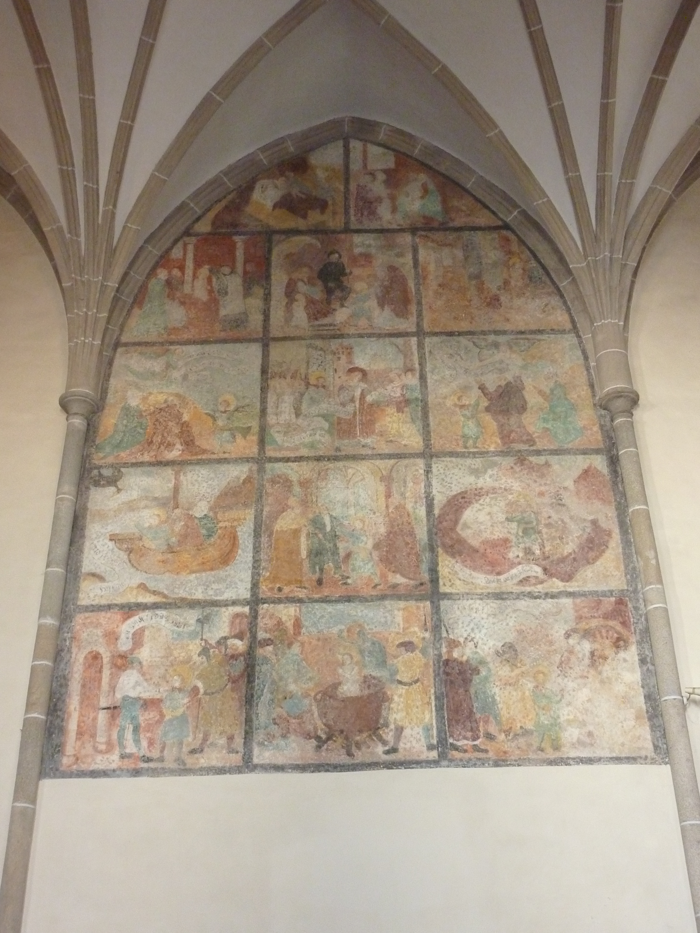 Pfarrkirche Bad Kreuzen, Oberösterreich - Fresken mit Szenen aus der Vita des hl. Vitus an der Langhausnordwand